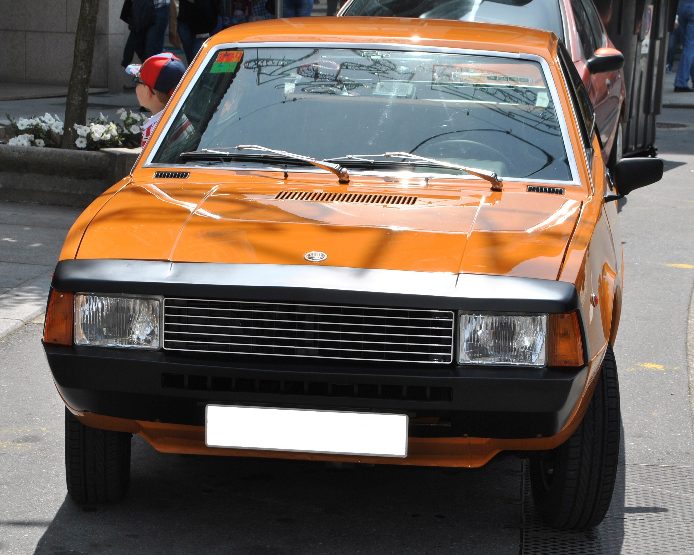 Véxase o título e as categorías.